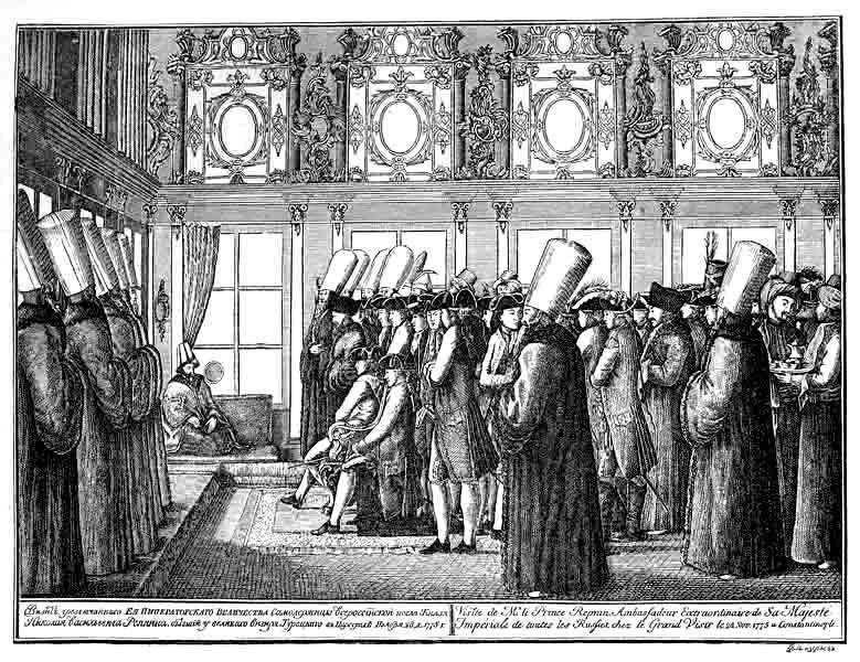 Аудиенция русского посла князя Н.В. Репнина у турецкого султана. 1775. Гравюра И. Бугреева. Последняя четверть XVIII в. В 1775—1776 гг. Н.В. Репнин возглавлял русское посольство в Турции. Здесь ему пришлось решать нелегкую задачу — контролировать турецкое правительство на предмет соблюдения статей Кючук-Кайнарджийского мирного договора (1774). По этому договору Россия получила территорию южной Украины до Южного Буга и свободный выход в Черное море (крепости Кинбурн, Керчь и Еникале).